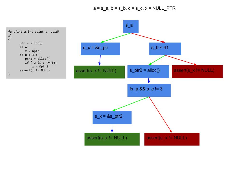 Représentation de l'exécution symbolique d'un code C.